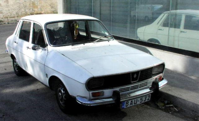 Renault 12